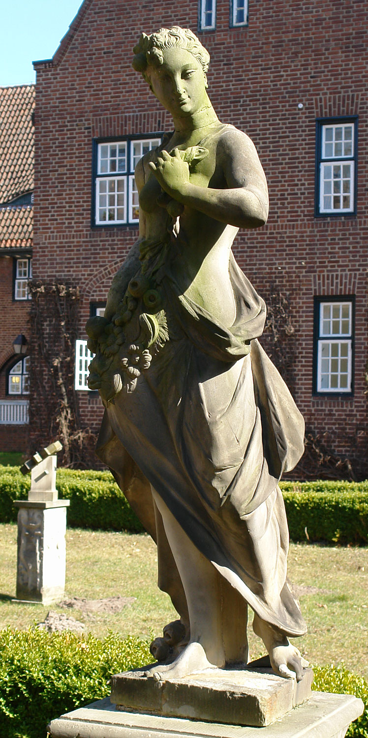 Egestorff-Stiftung in Bremen: Sandsteinfigur wahrscheinlich von Theophilus Wilhelm Frese (1696-1763) „Frühling“. Das abgebildete Objekt ist ein geschütztes Kulturdenkmal in der Freien Hansestadt Bremen, mit der Nr. 0970,T002 beim Landesamt für Denkmalpflege registriert.